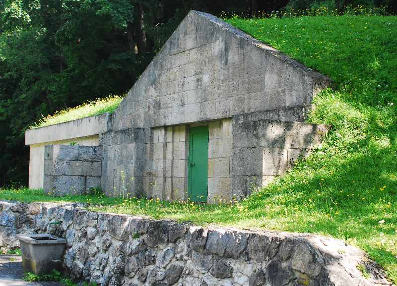 Die Zumeßkammer der I. Wiener Hochquellenwasserleitung in Kaiserbrunn in Niederösterreich